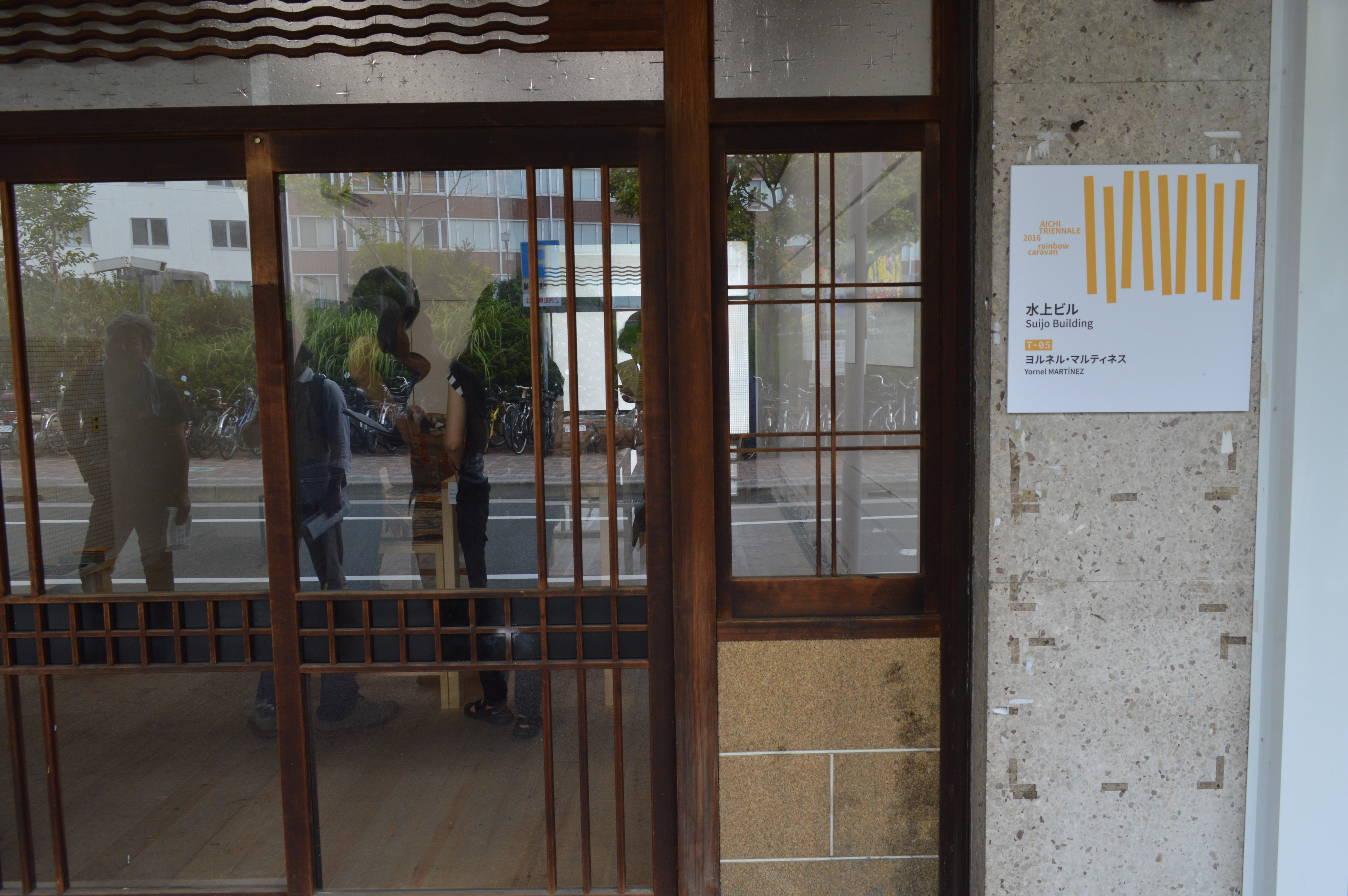 豊橋市の水上ビルのひとつ「大豊ビル」の大豊商店街。あいちトリエンナーレ2016の開催風景。建物の中にはヨルネル・マルティネスの作品が展示されている。